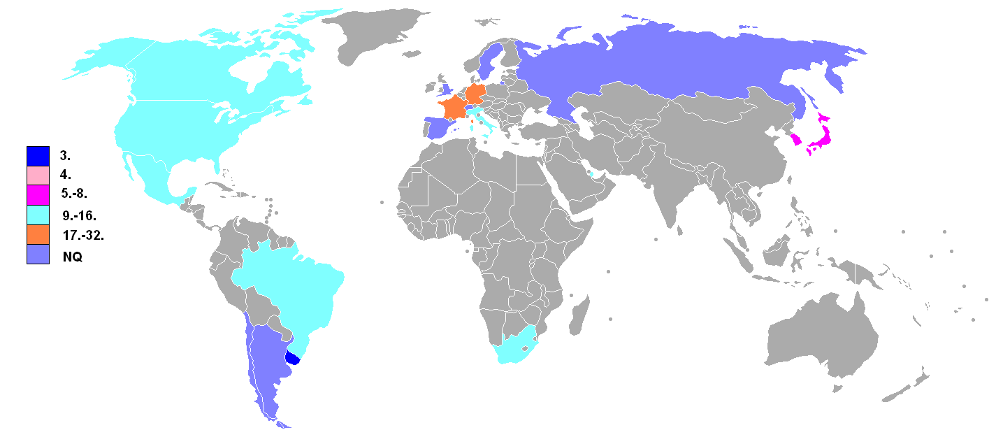 Beste Platzierungen der Mannschaft der USA in den Austragungsländern der FIFA-Fußballweltmeisterschaften